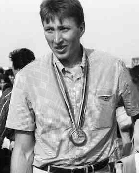 Sosirea in tara a lotului olimpic de canotaj, participant la Jocurile Olimpice de Vara de la Barcelona (Spania), desfasurate in perioada 25 iulie - 9 august 1992. In imagine: Nicolae Taga (stg), component al echipei masculine de canotaj doua rame cu carmaci; echipa a castigat medalia de bronz in cadrul competitiei.